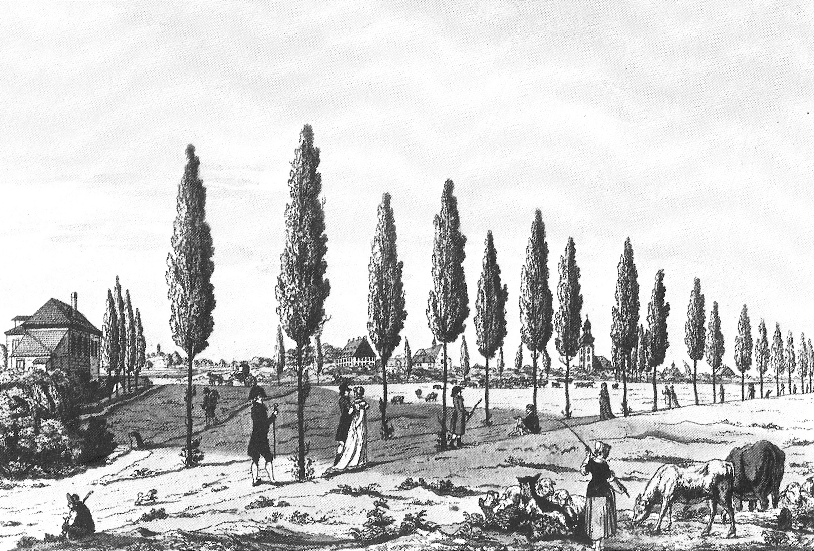 Pappelallee und Spazierweg auf der historischen Bornheimer Heide bei Frankfurt am Main. Zeichnung von F. L. Neubauer um 1800